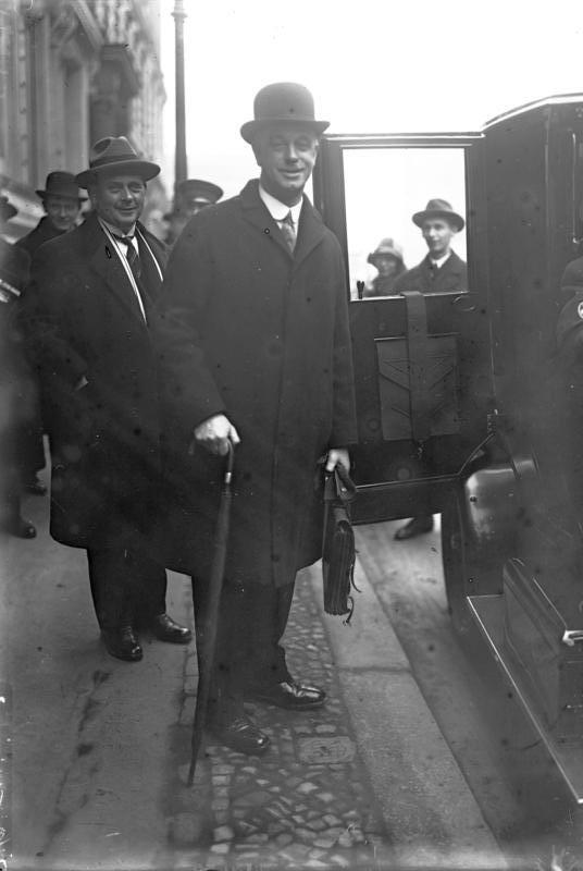 Der Generalsekretär des Völkerbundes Sir Eric Drummond will von seinem Posten zurücktreten ! Sir Eric Drummond, welcher sich durch den Misserfolg der chinesisch-japanischen Schlichtungsaffäre persönlich getroffen fühlt, will von seinem Posten zurücktreten.